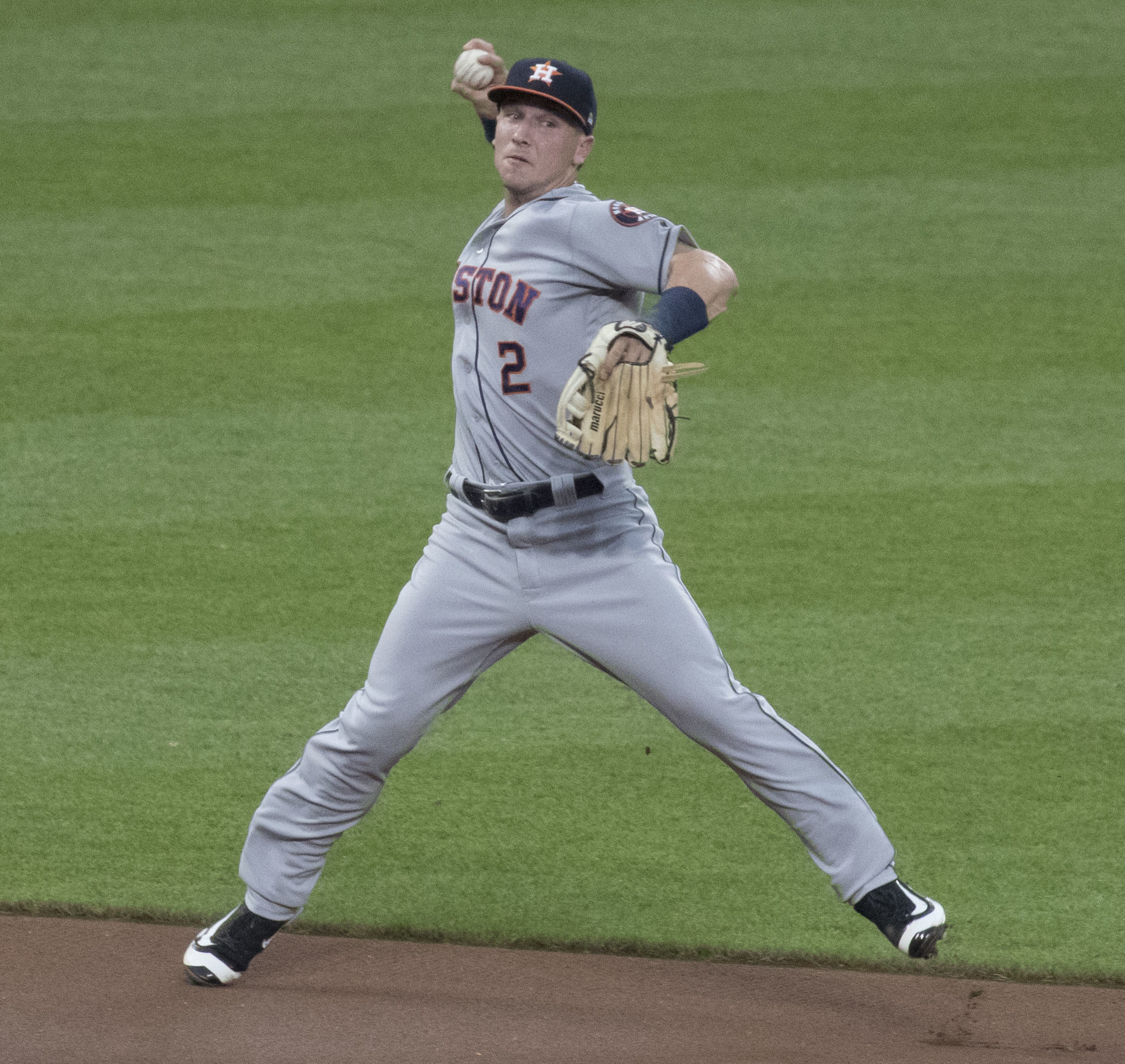 Astros at Orioles 7/21/17